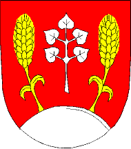 Znak obce Čavisov.